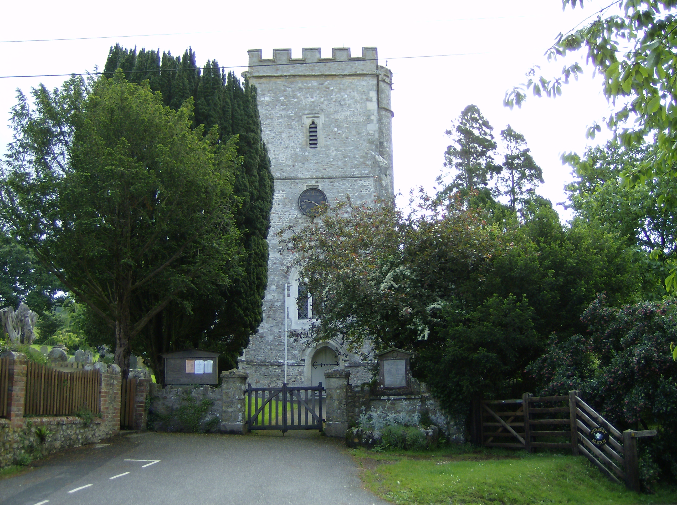 L'église de Musbury.